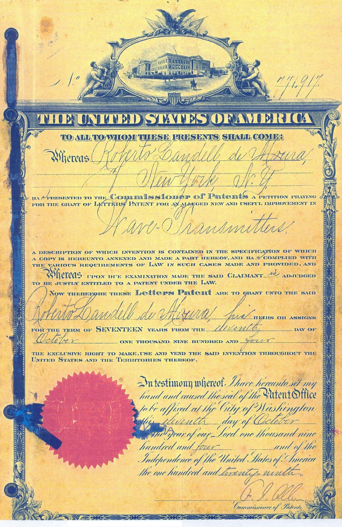 Patente do "Wave Transmitter" - Transmissor de Ondas - obtida do Departamento de Patentes dos Estados Unidos em 11 de Outubro de 1904 - Pe. Roberto Landell de Moura.